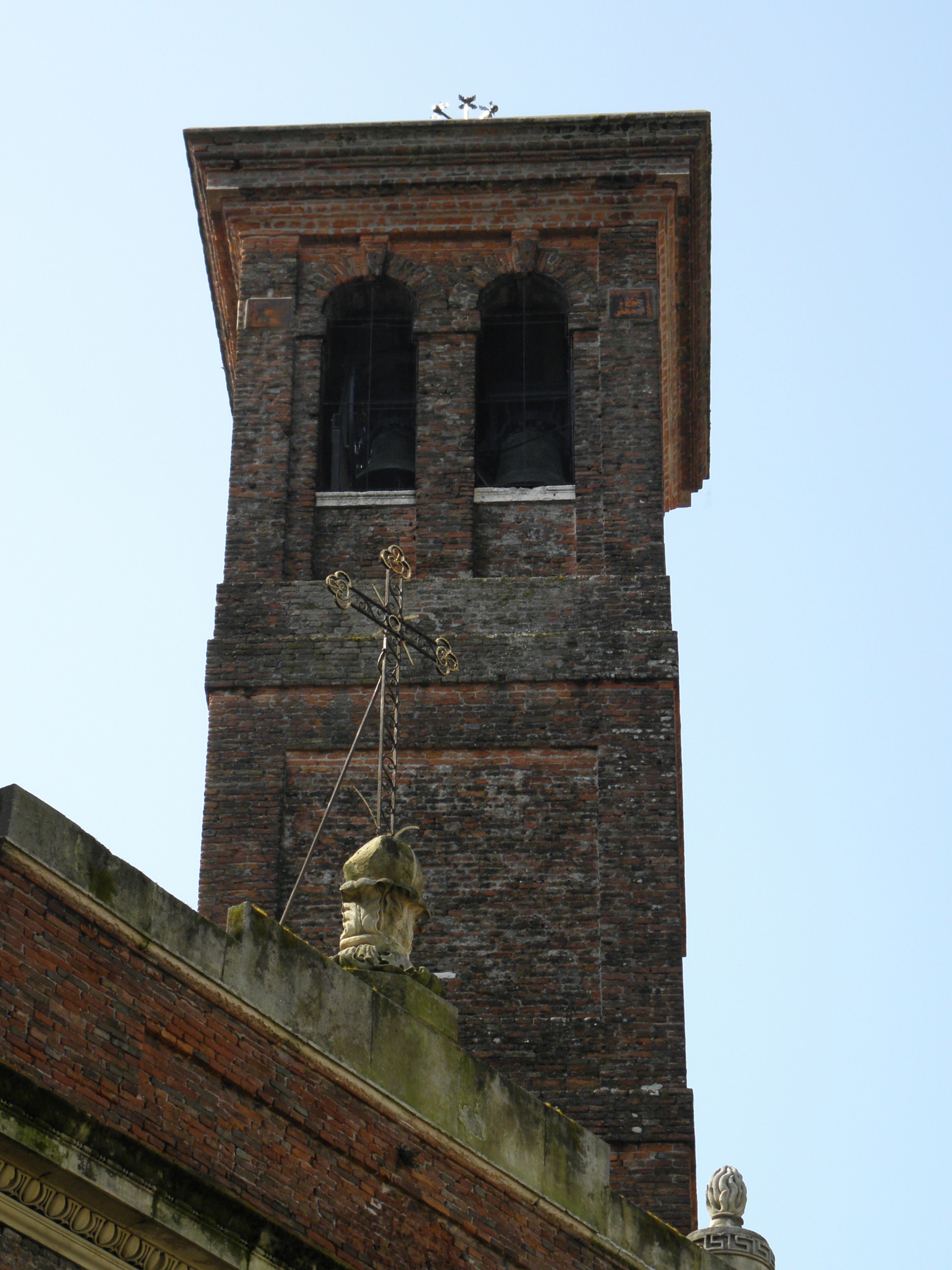 Legnago, il campanile del Duomo di San Martino Vescovo.